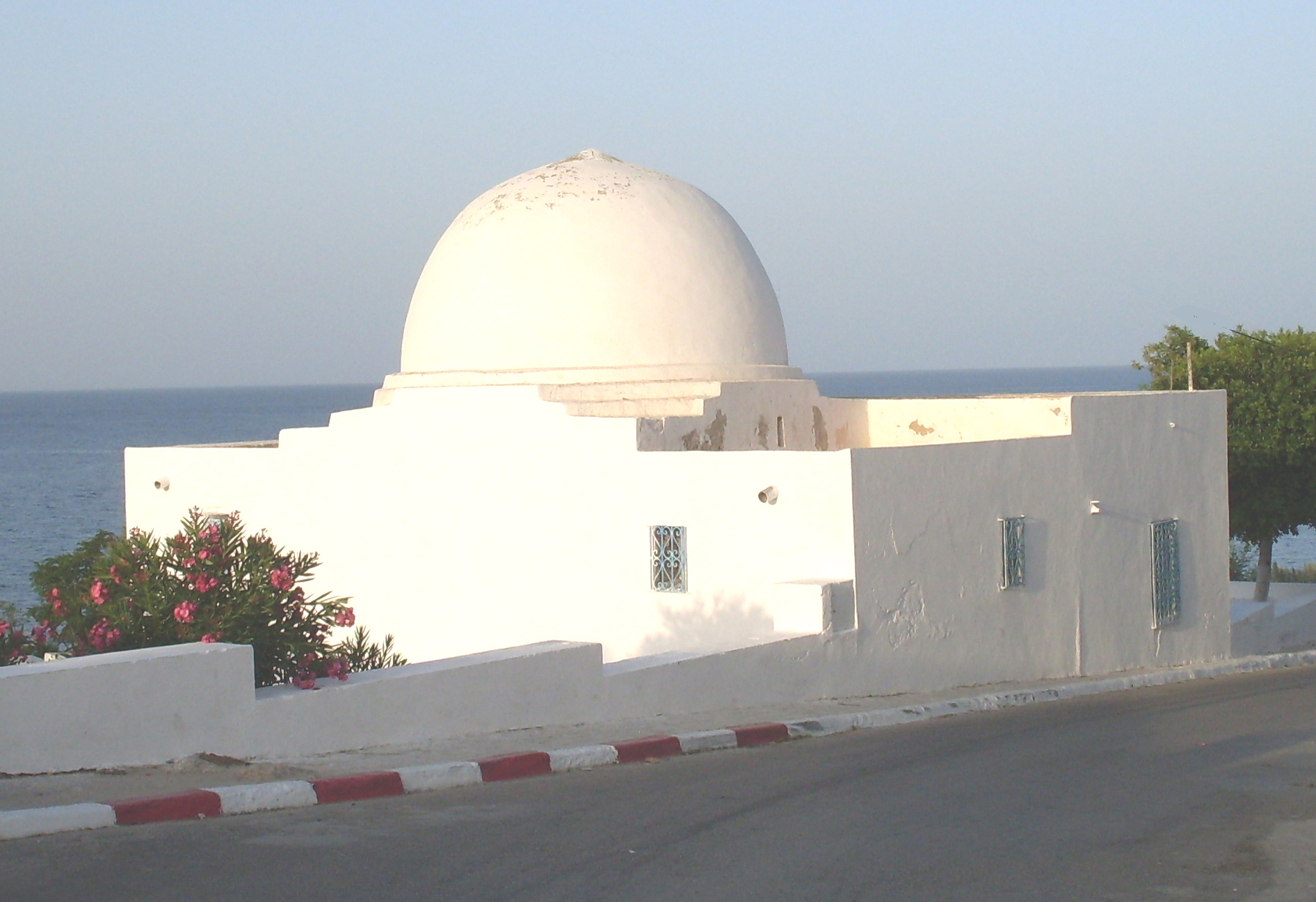 Zaouia en face du port et de la cimetière de Hergla